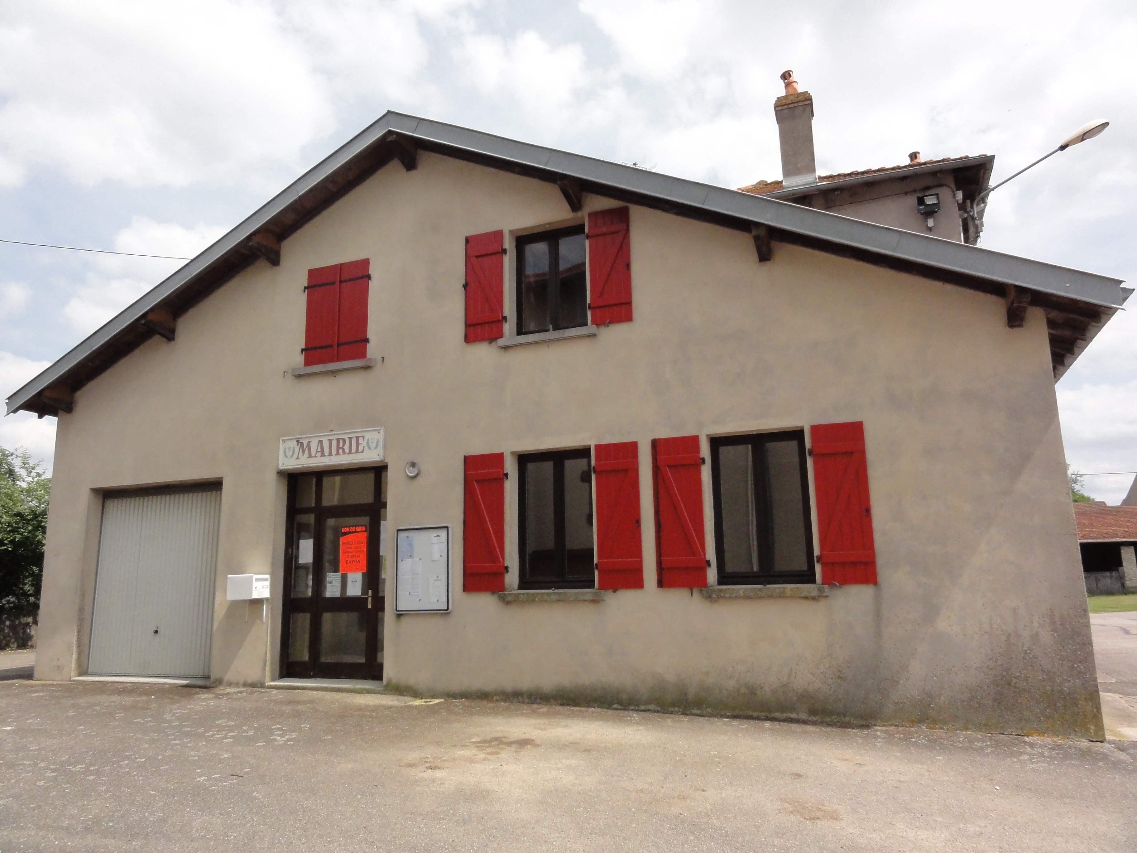 Loromontzey (M-et-M) mairie